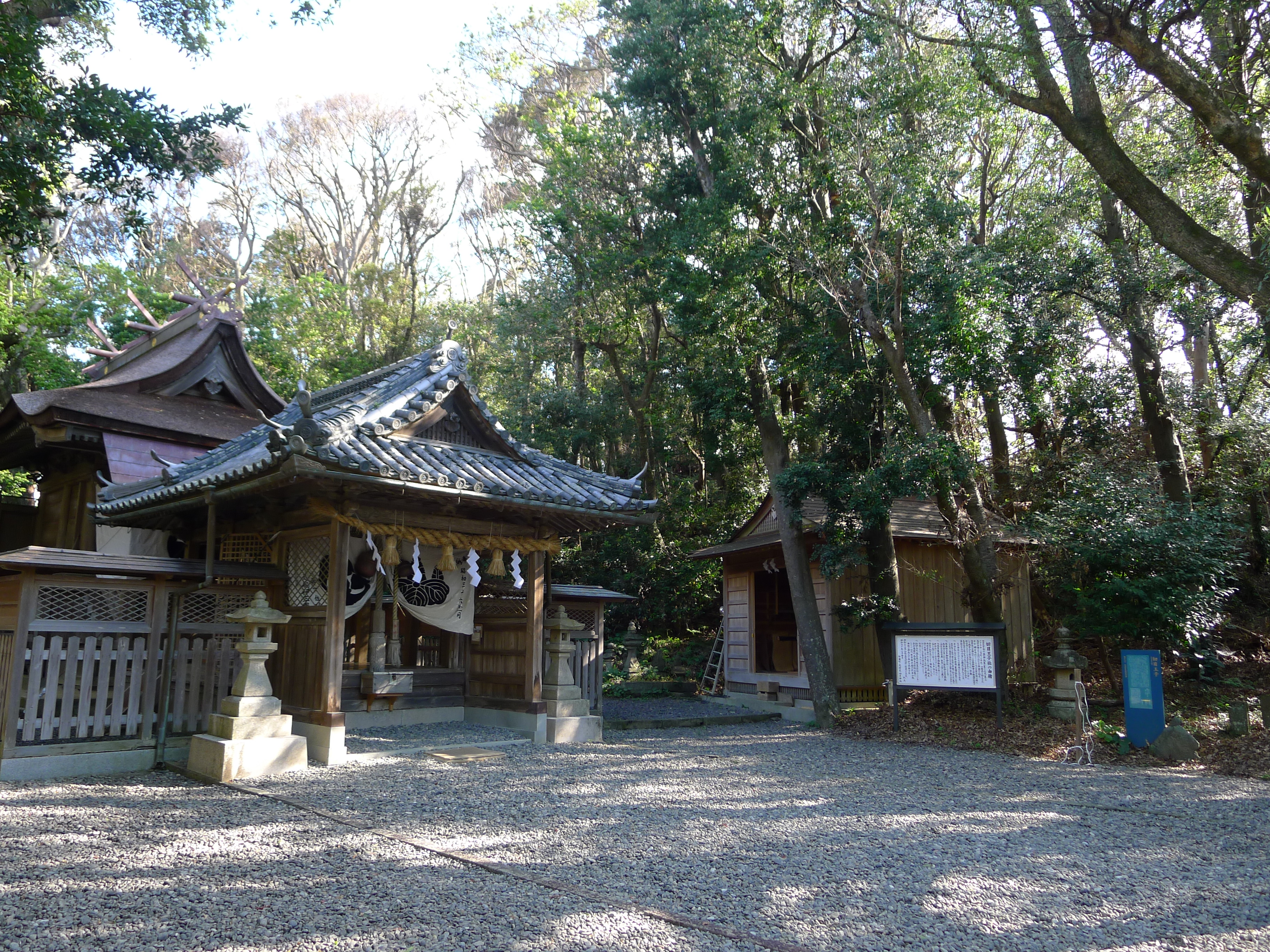 熊野古道・紀伊路の九十九王子の一つ切目王子を祀る切目神社（和歌山県印南町）